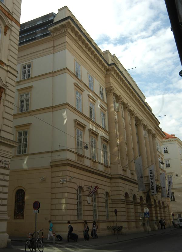 Das Niederösterreichische Landhaus in der Herrengasse in Wien